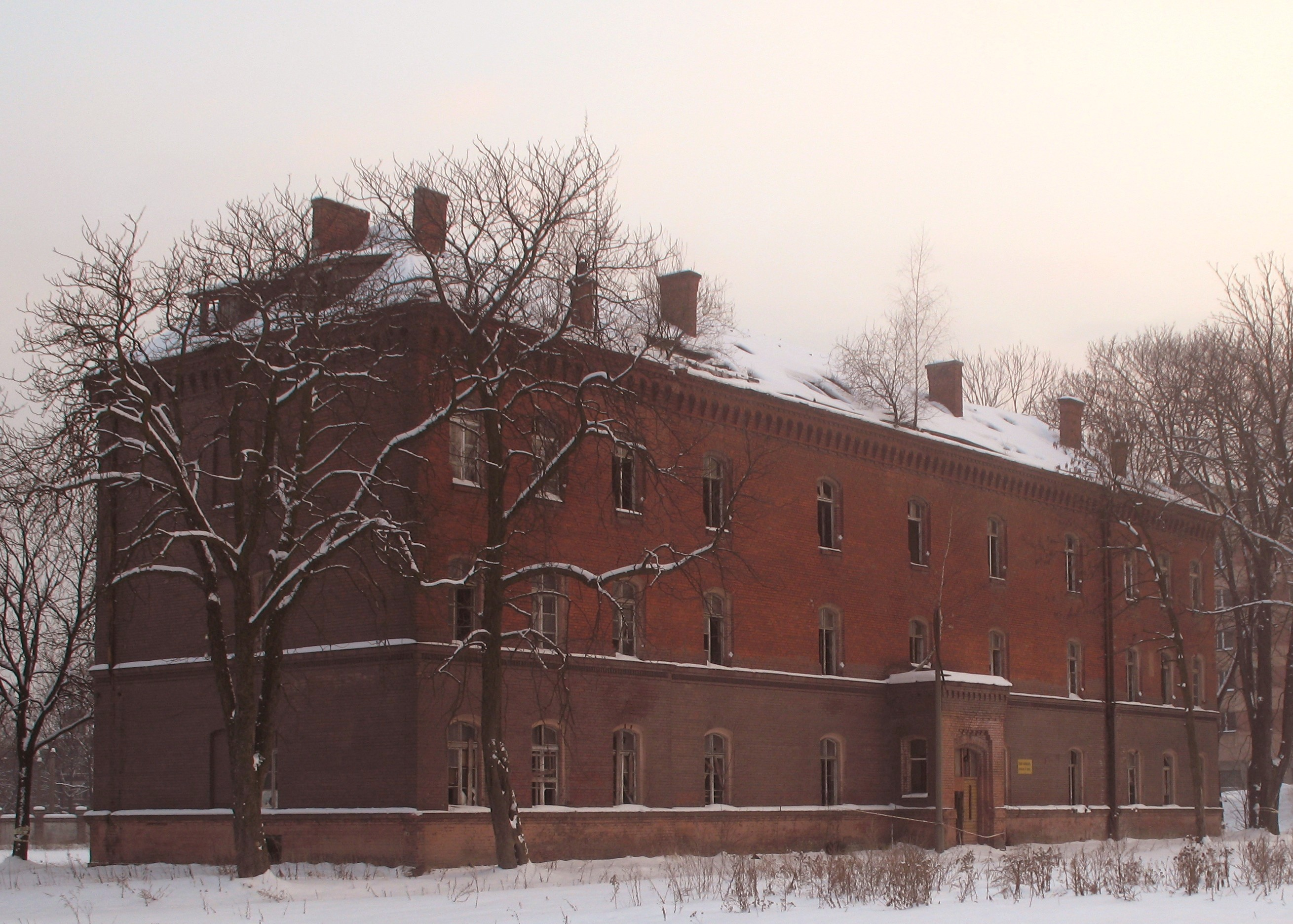 Dawne koszary WOP w Gliwicach (budynek koszarowy).